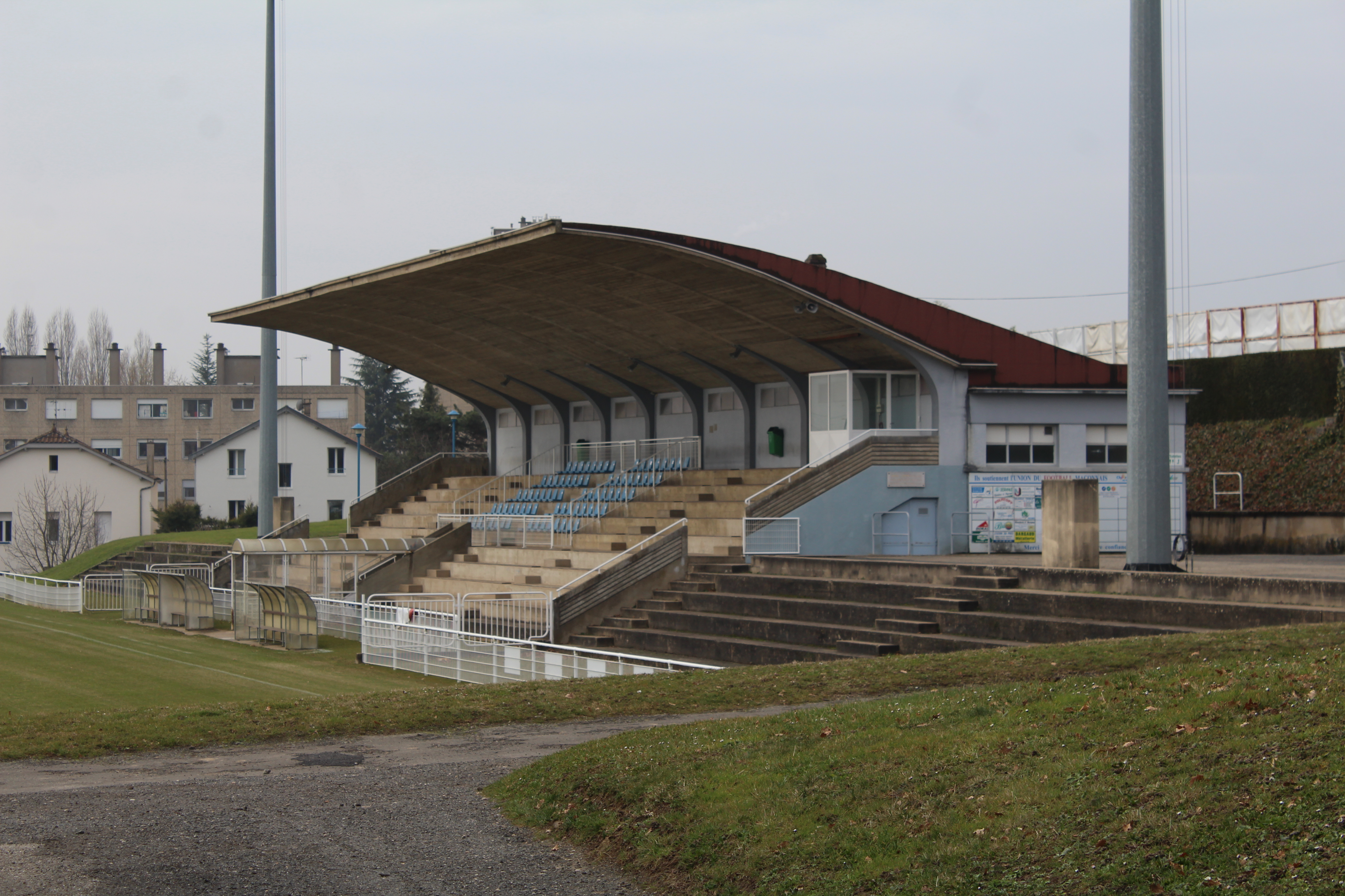 Stade Pierre Guérin (Mâcon)